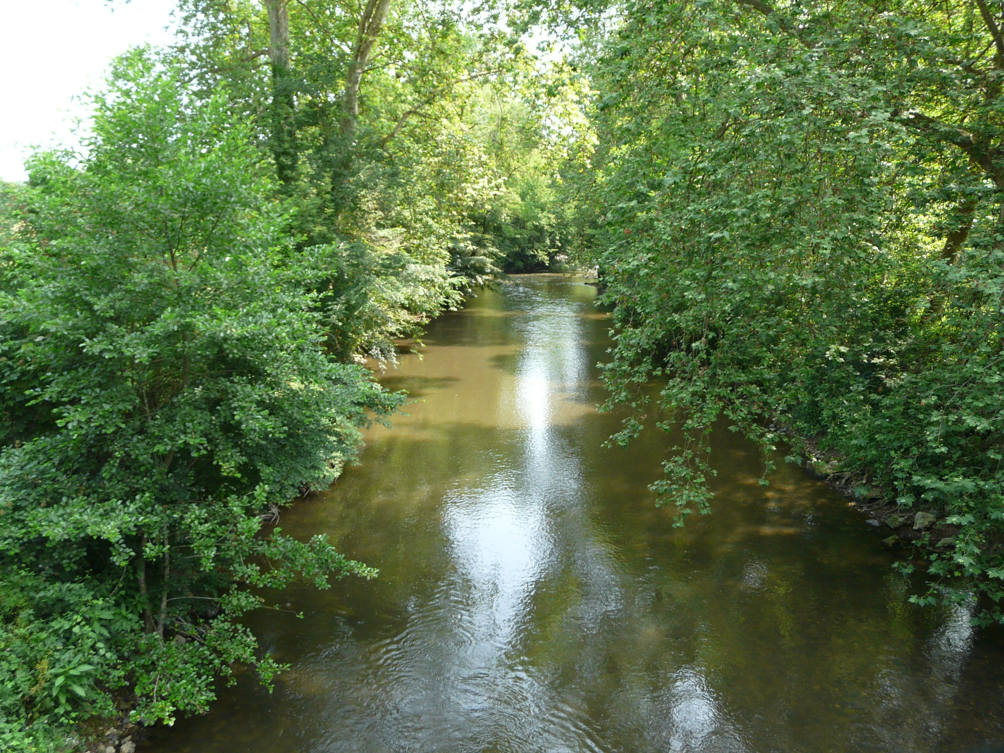 L'Auvézère en amont du pont du Temple de l'Eau, Cherveix-Cubas, Dordogne, France.